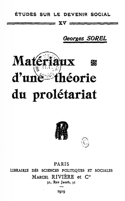 Georges Sorel, Matériaux d'une théorie du prolétariat, 1919, couv